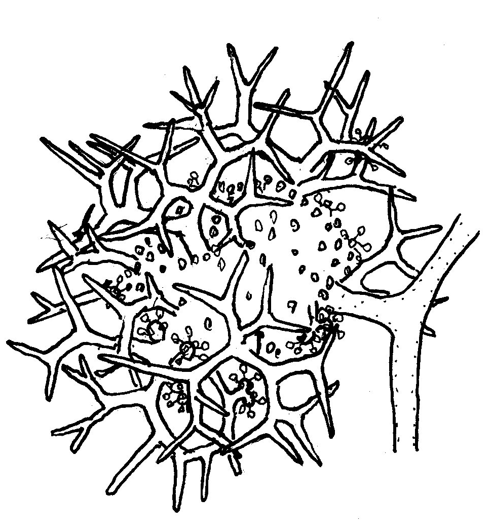 Benny & Benjamin(1975)より模写